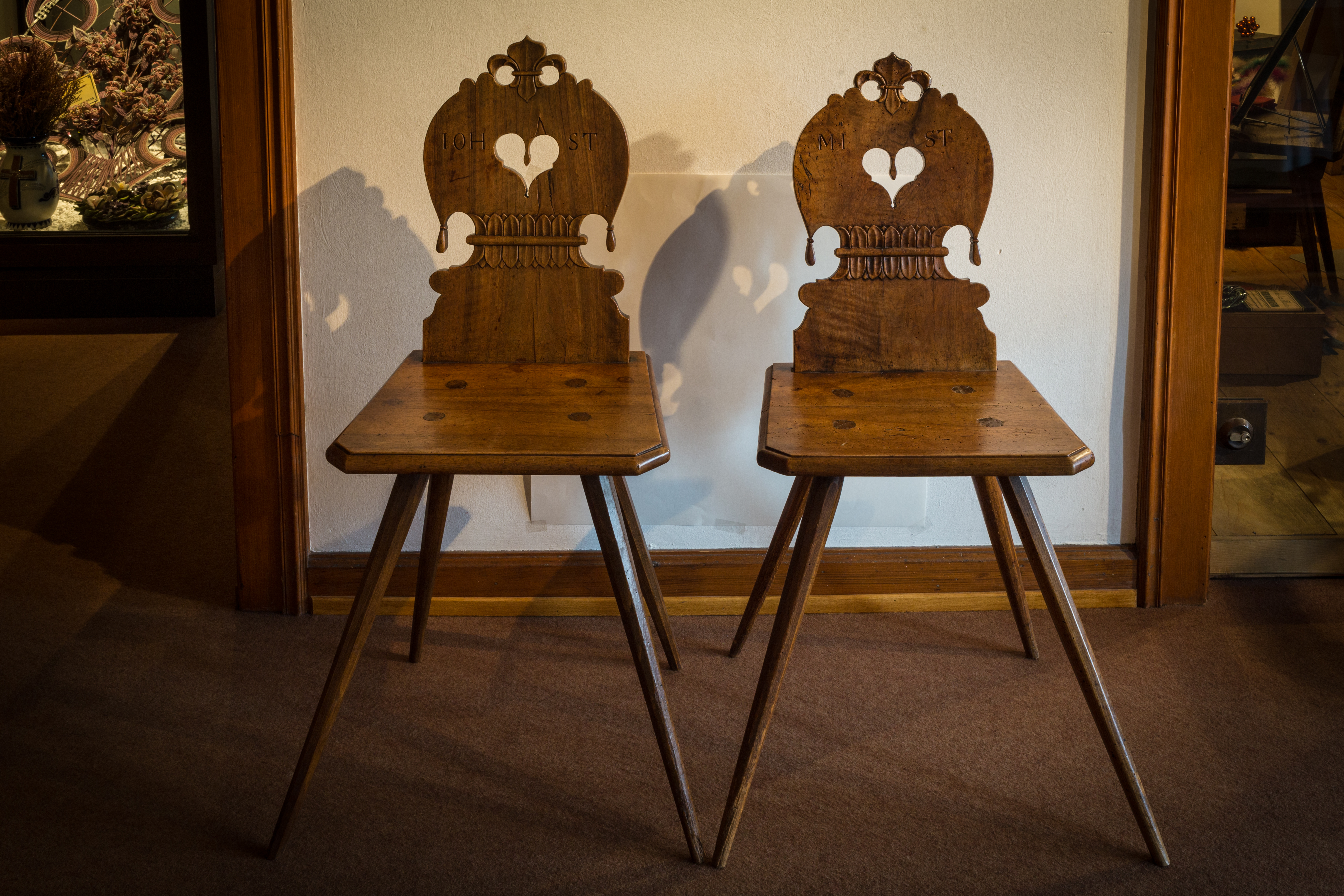 Paire de chaises alsaciennes offertes en cadeau de mariage et portant les initiales des époux. Epoque Restauration. 19e siècle. Musée alsacien de Strasbourg.